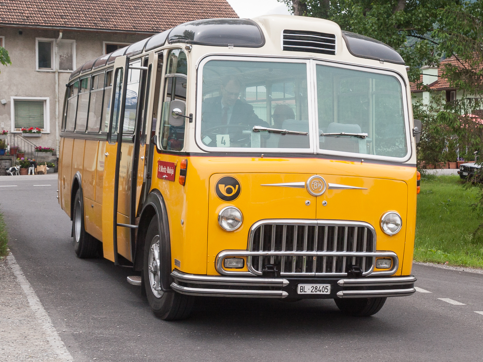 Bus FBW C40U